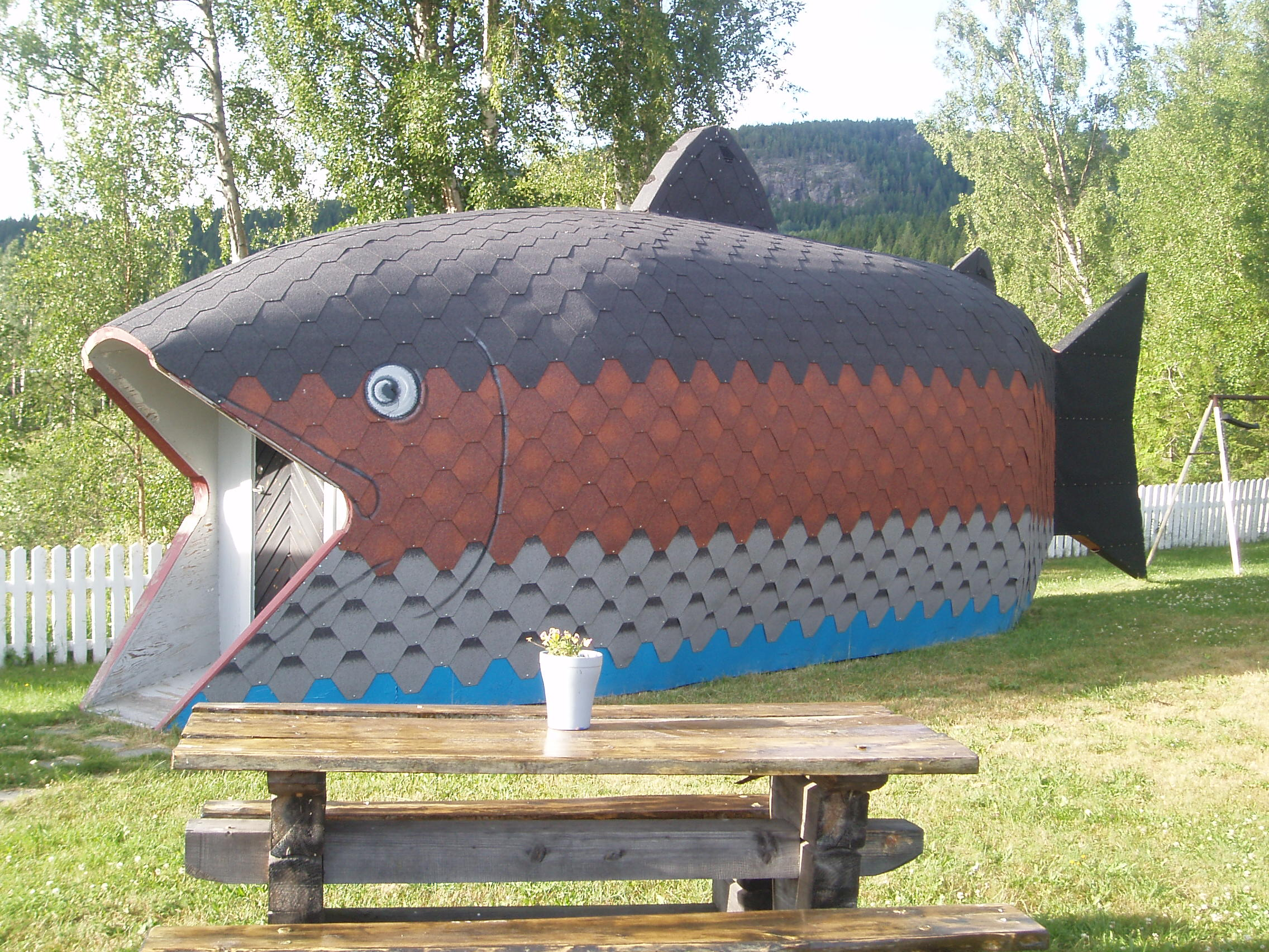 Turistinformationen Fisken på Björkängen, Ljustorp